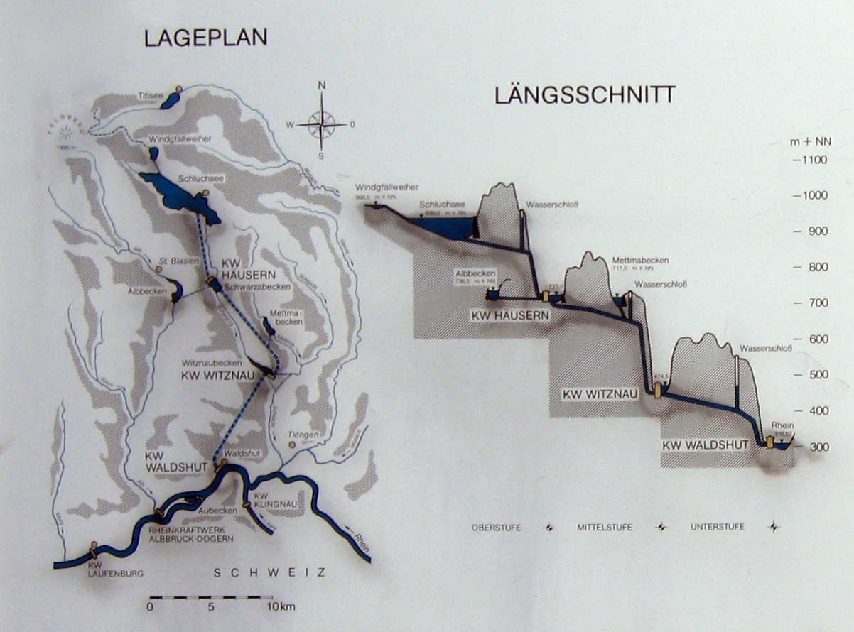 Dauerhaft angebrachte Infotafel zur Werksgruppe Schluchsee